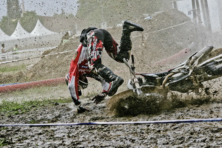 Chute de David Frétigné lors de la Grappe de Cyrano 2011 - photo